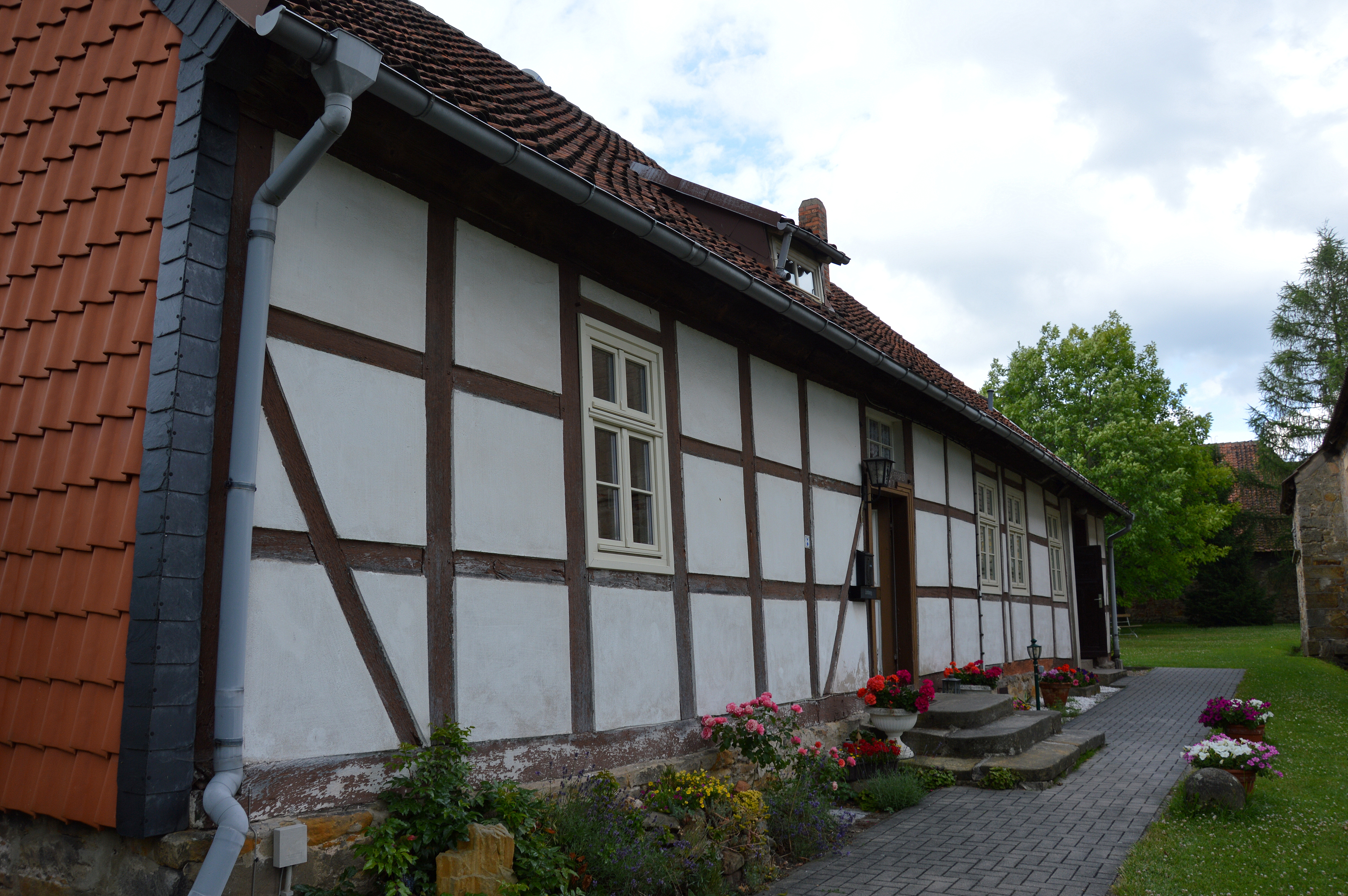 Haus Dorfstraße 9 in Groß Bartensleben